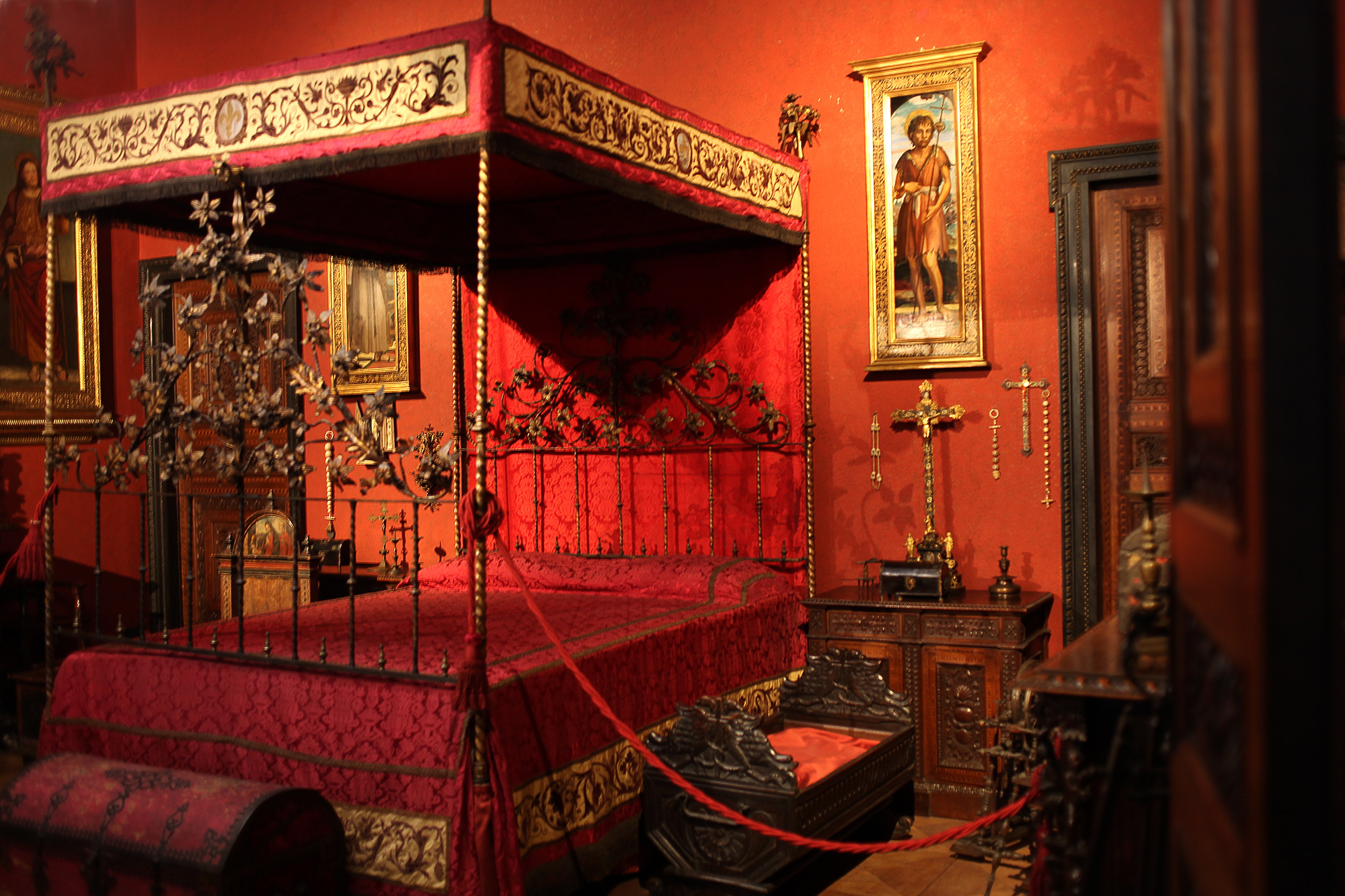 Museo Bagatti-Valsecchi, la Camera Rossa di Carolina Borromeo e Giuseppe Bagatti